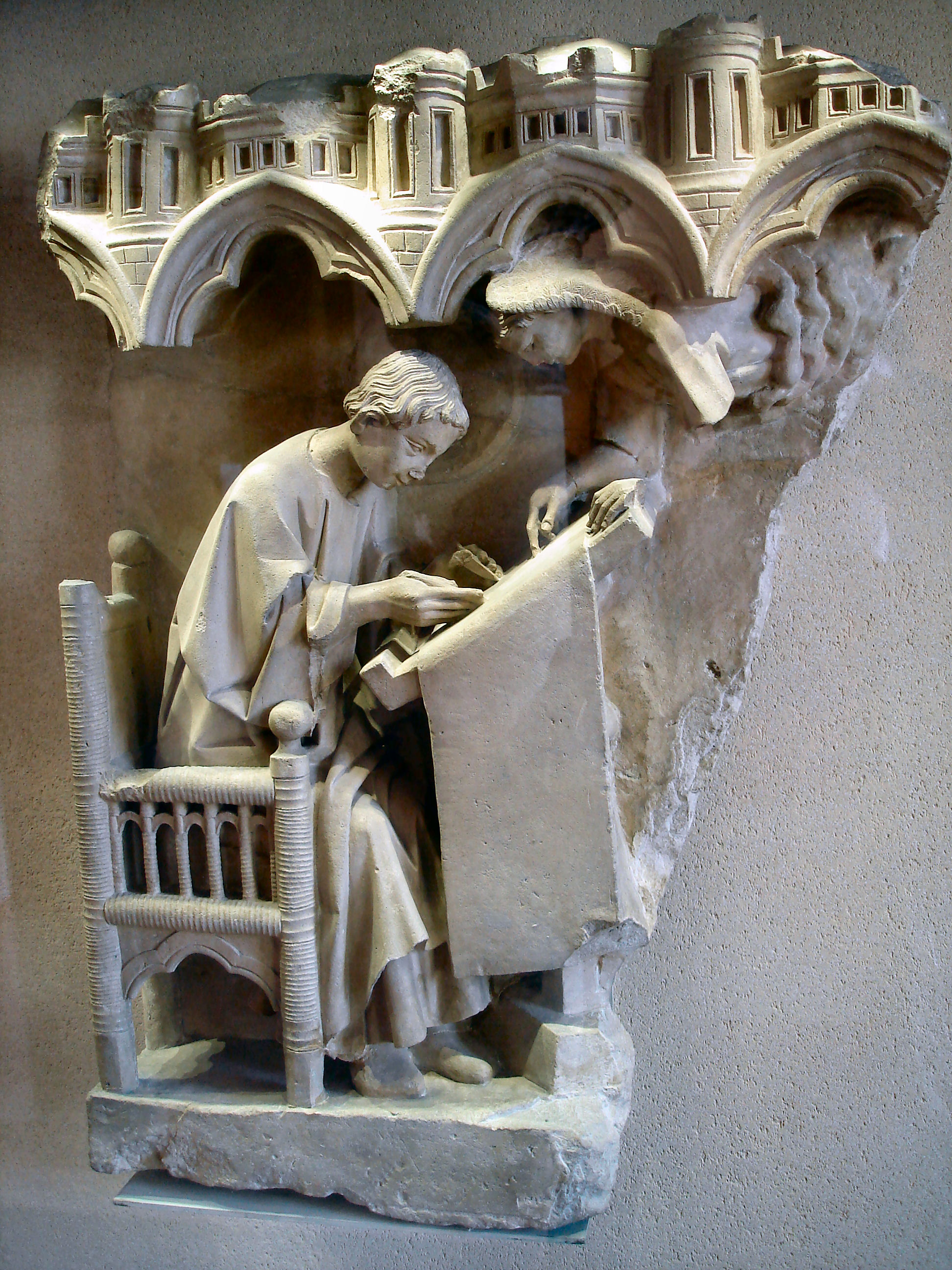 L'évangéliste saint Mathieu écrivant sous la dictée de l'ange Provenant du jubé de la cathédrale de Chartres, détruit après 1763 ? Pierre calcaire Acquis en 1905